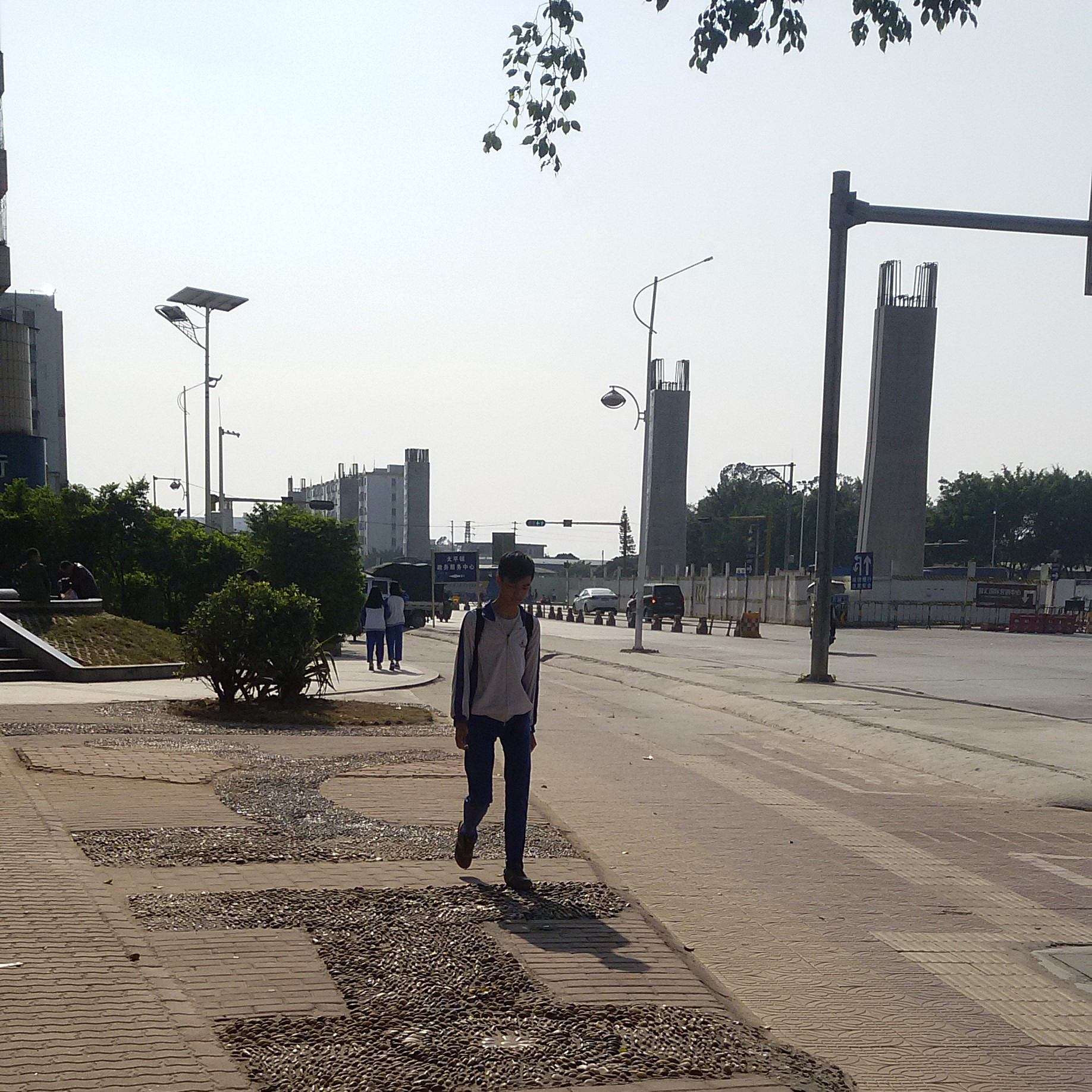 粵語: 從化太平第二中學嘅長袖校服（藍白款）